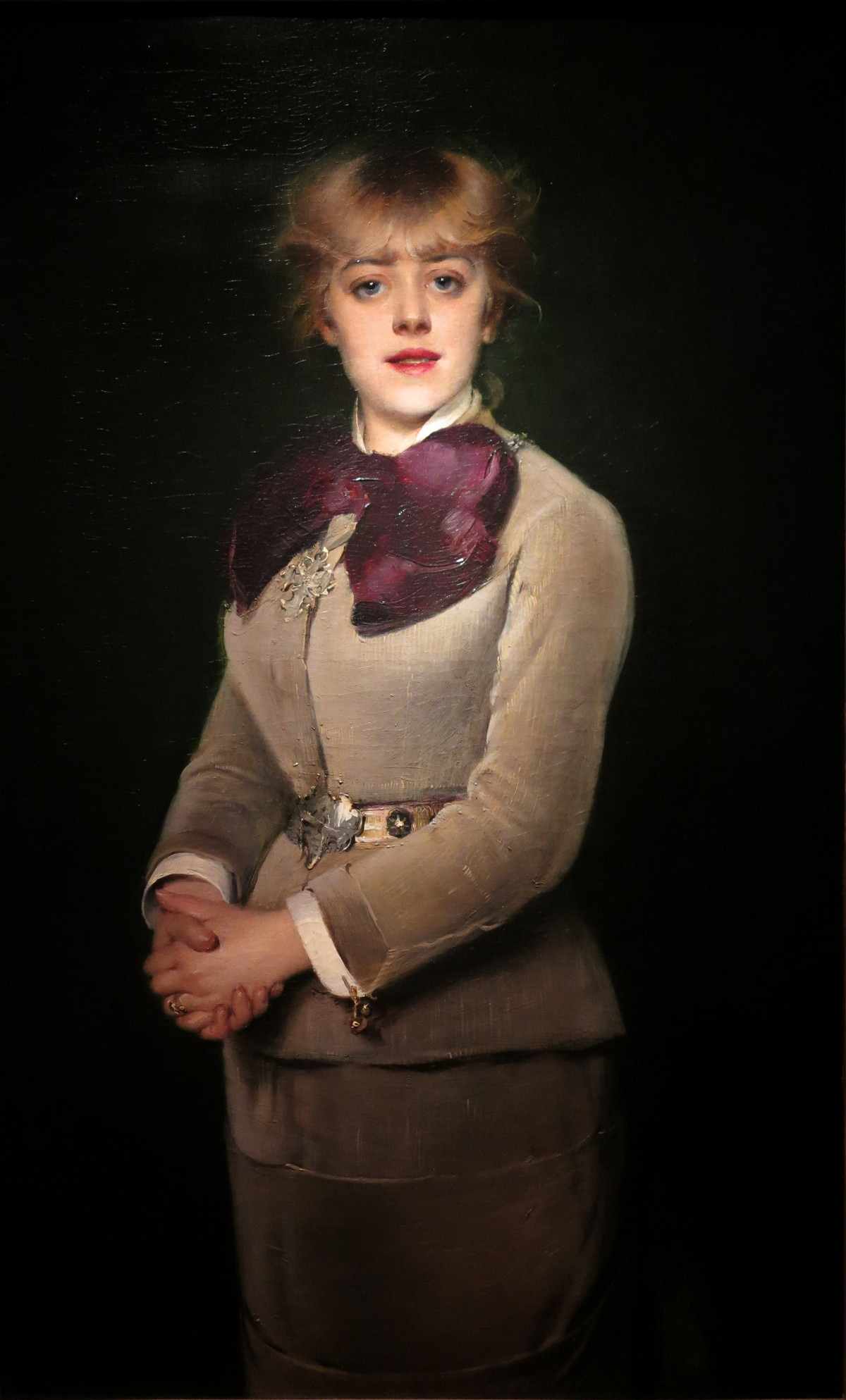 Jeanne Samary (1857-1890), sociétaire de la comédie française